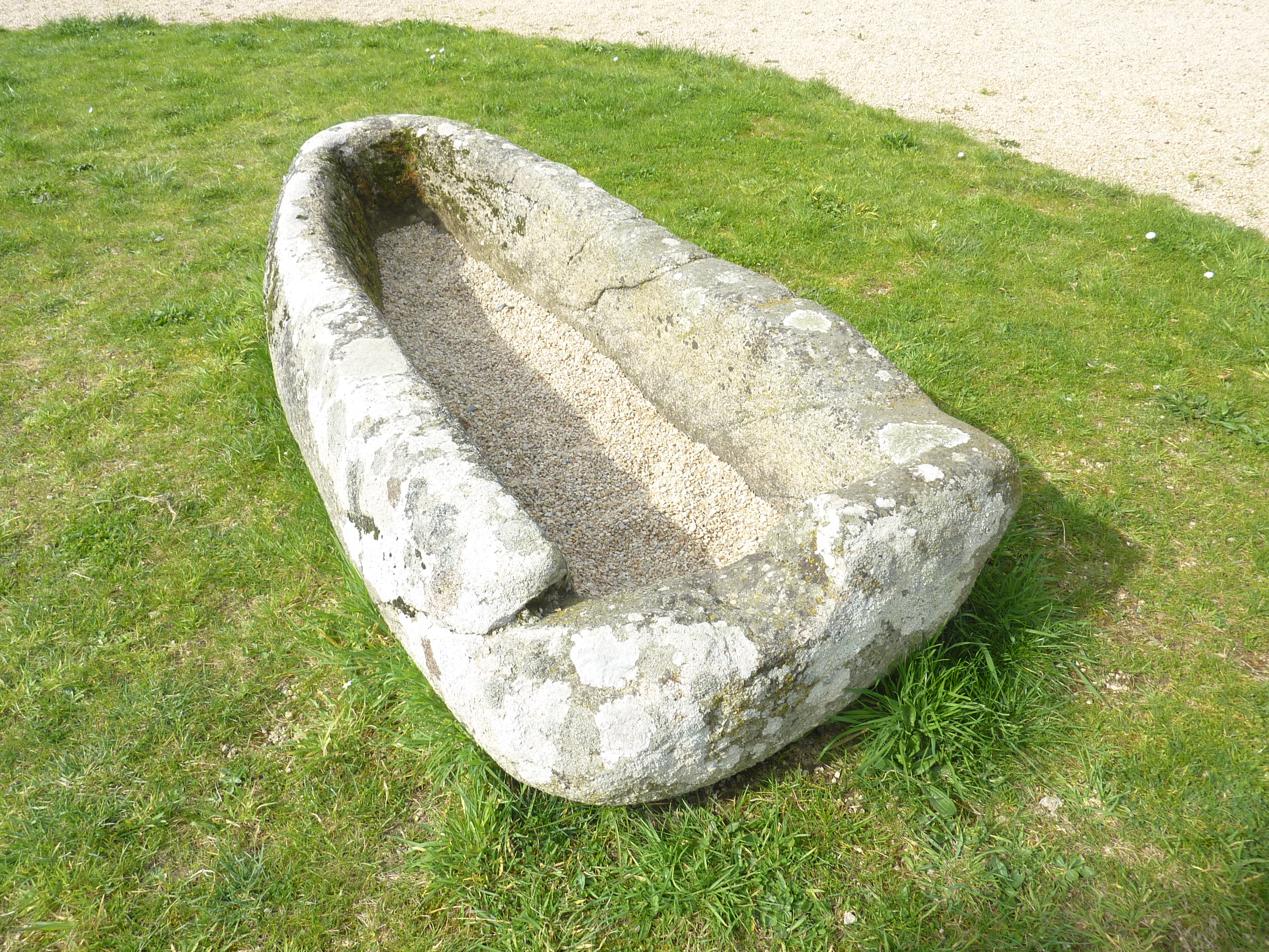 Trégrom : le sarcophage de saint Brandan. Ce sarcophage monolithique passe pour être son tombeau et est toujours visible dans le village.